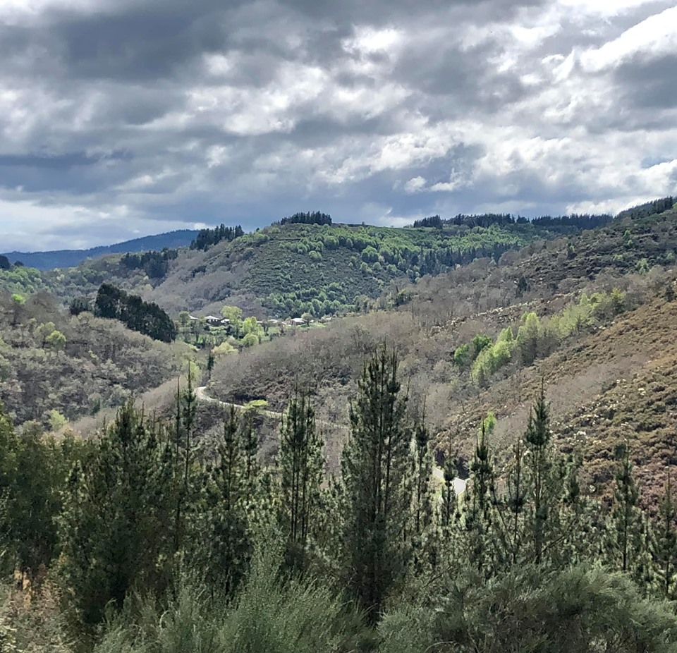 Lugar de Sevane. Parroquia Quintá de Cancelada. Concello de Becerreá